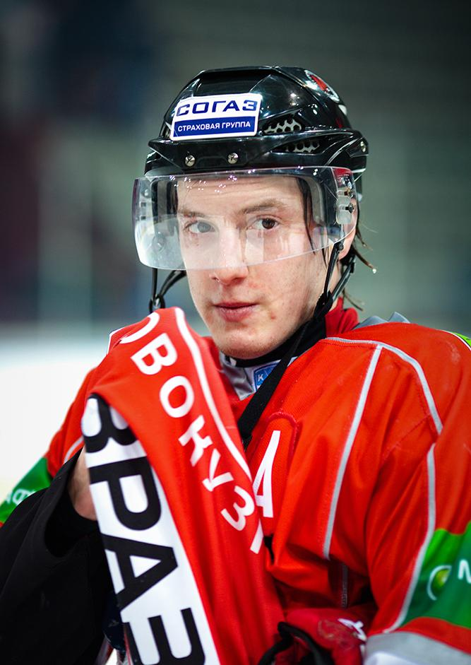 Нападающий новокузнецкого «Металлурга» Дмитрий Кагарлицкий во время матча чемпионата КХЛ против московского «Динамо» 21 декабря 2012 года.